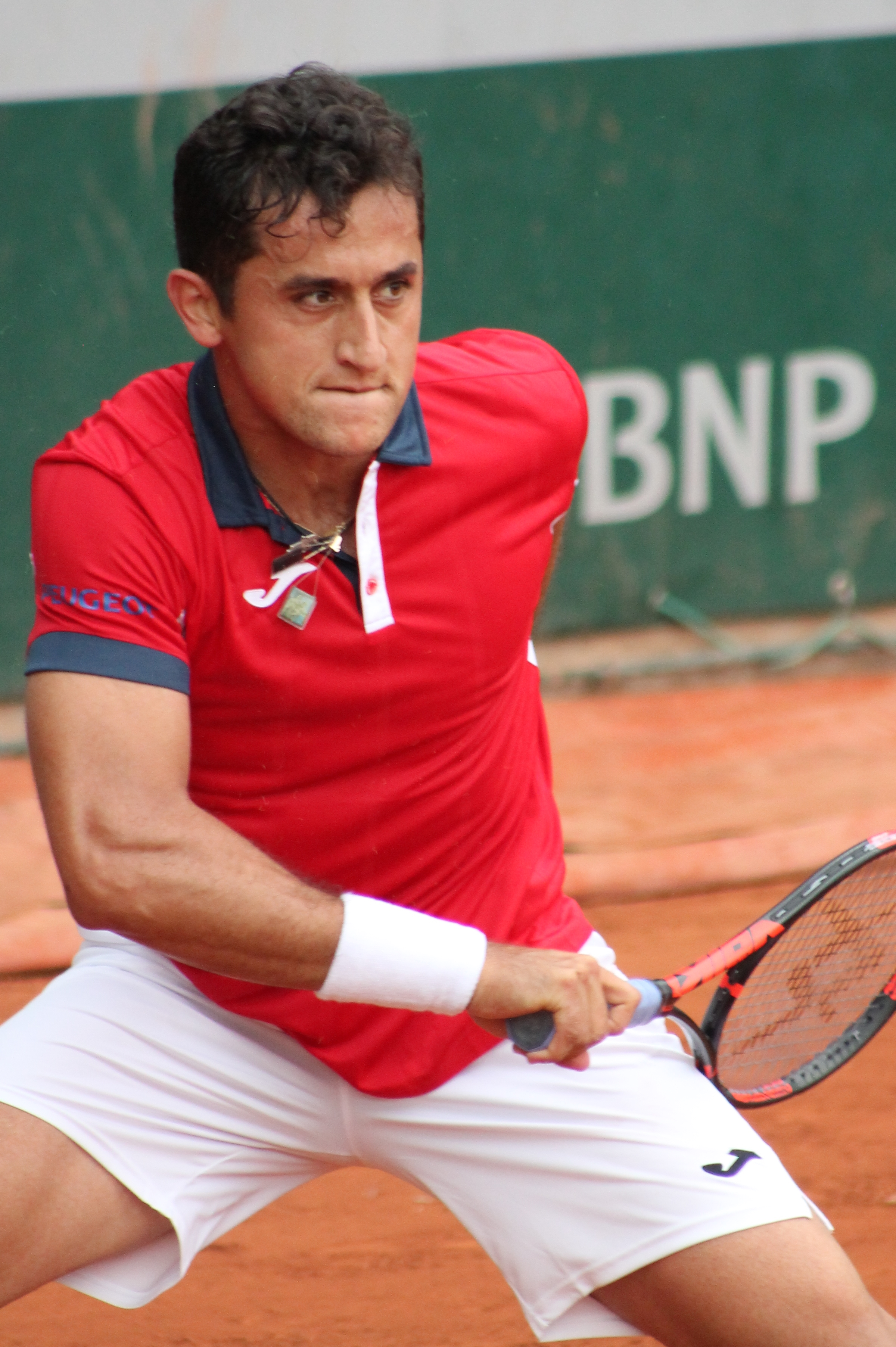 Almagro RG16 (1)